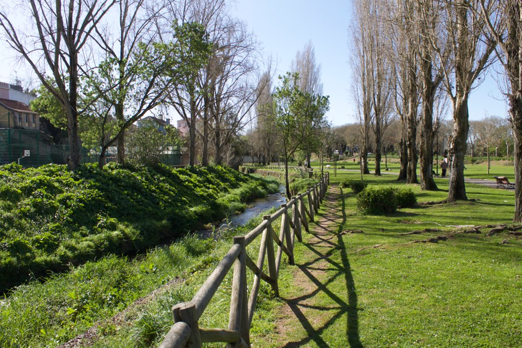 Queluz